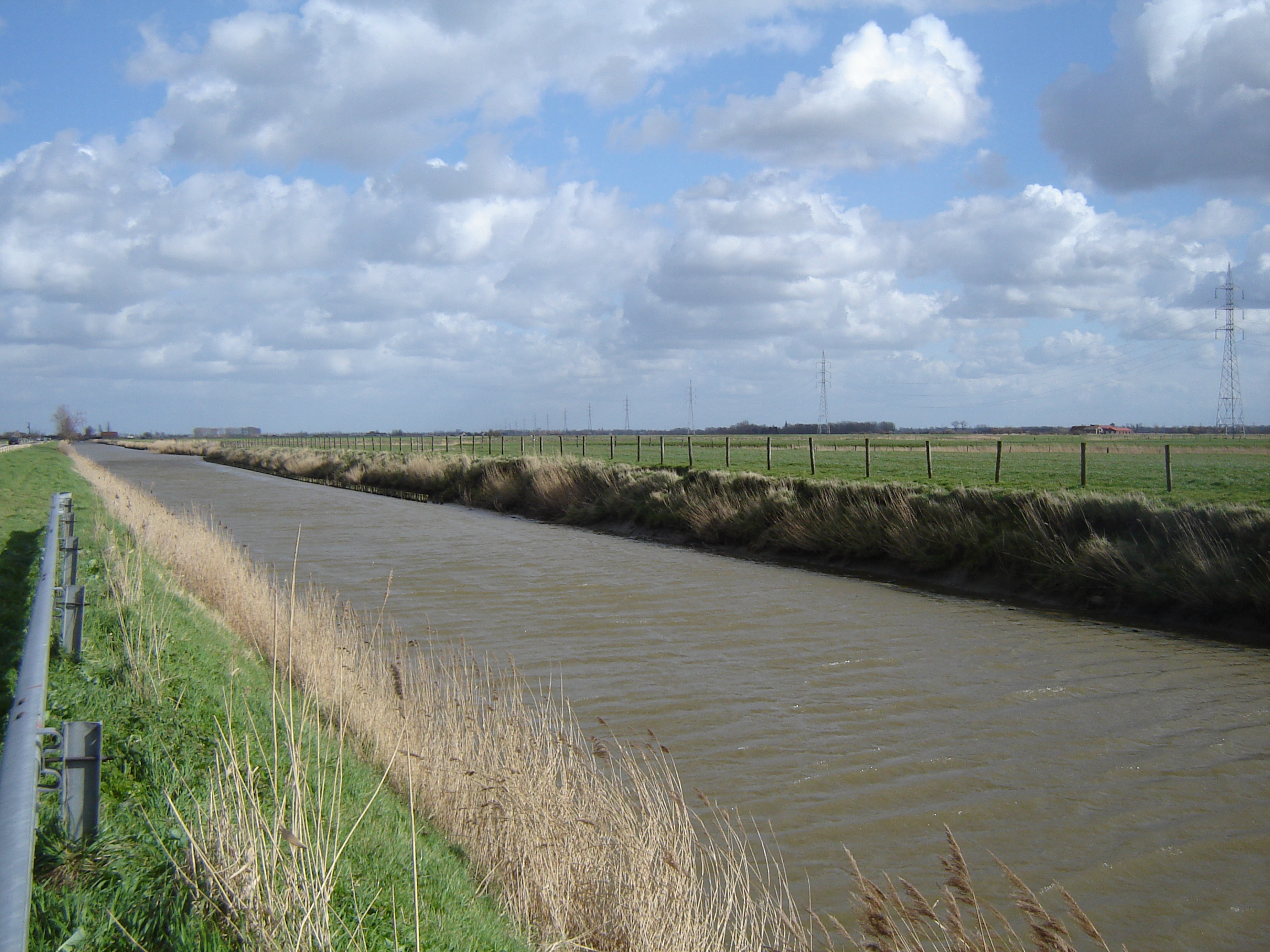 Noordede (or Noord-Ede), small river in Klemskerke, De Haan, West Flanders, Belgium